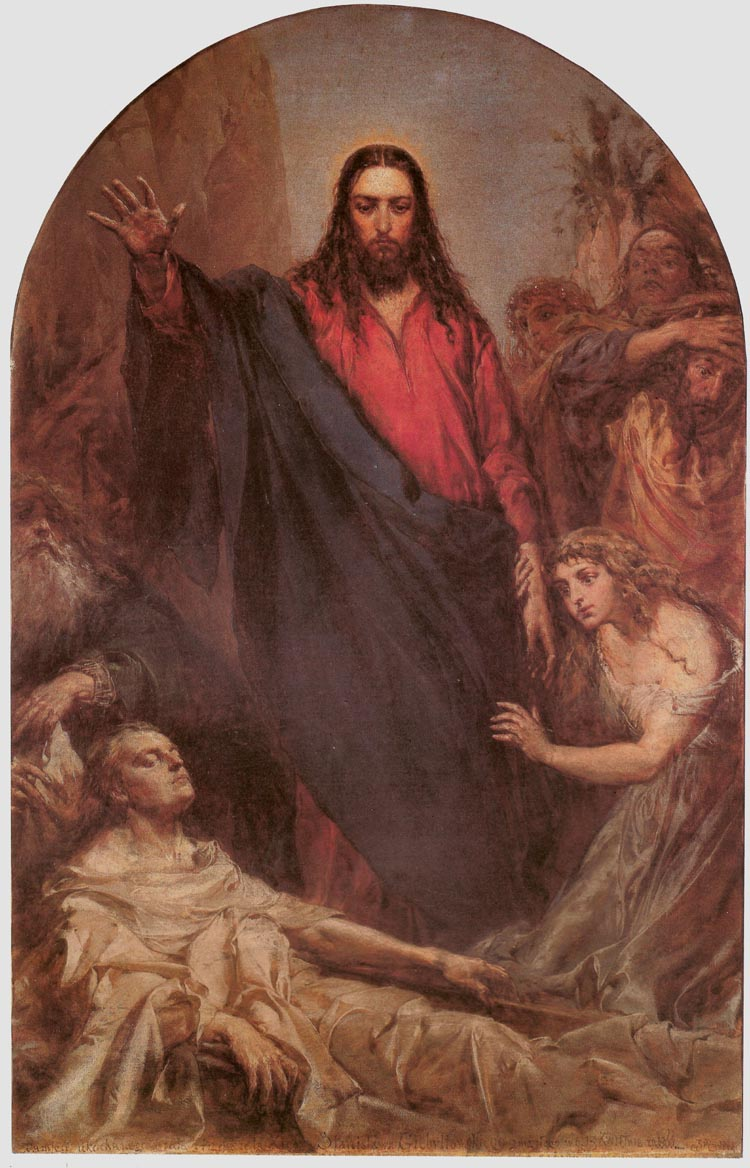 Wskrzeszenie Łazarza. Olej.